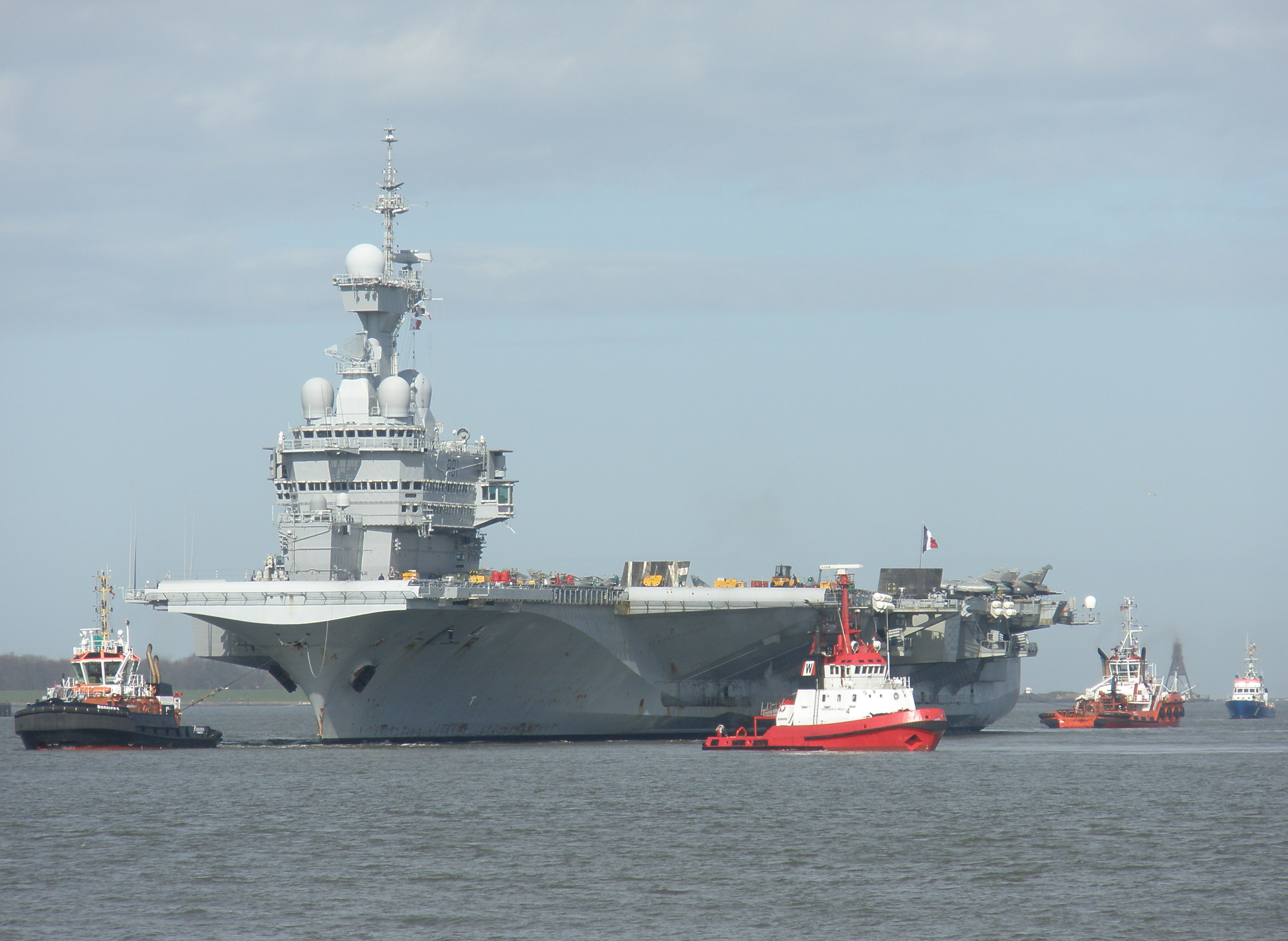 Der französische Flugzeugträger Charles de Gaulle (R 91) bei der Ankunft in Cuxhaven am 09.04.2010